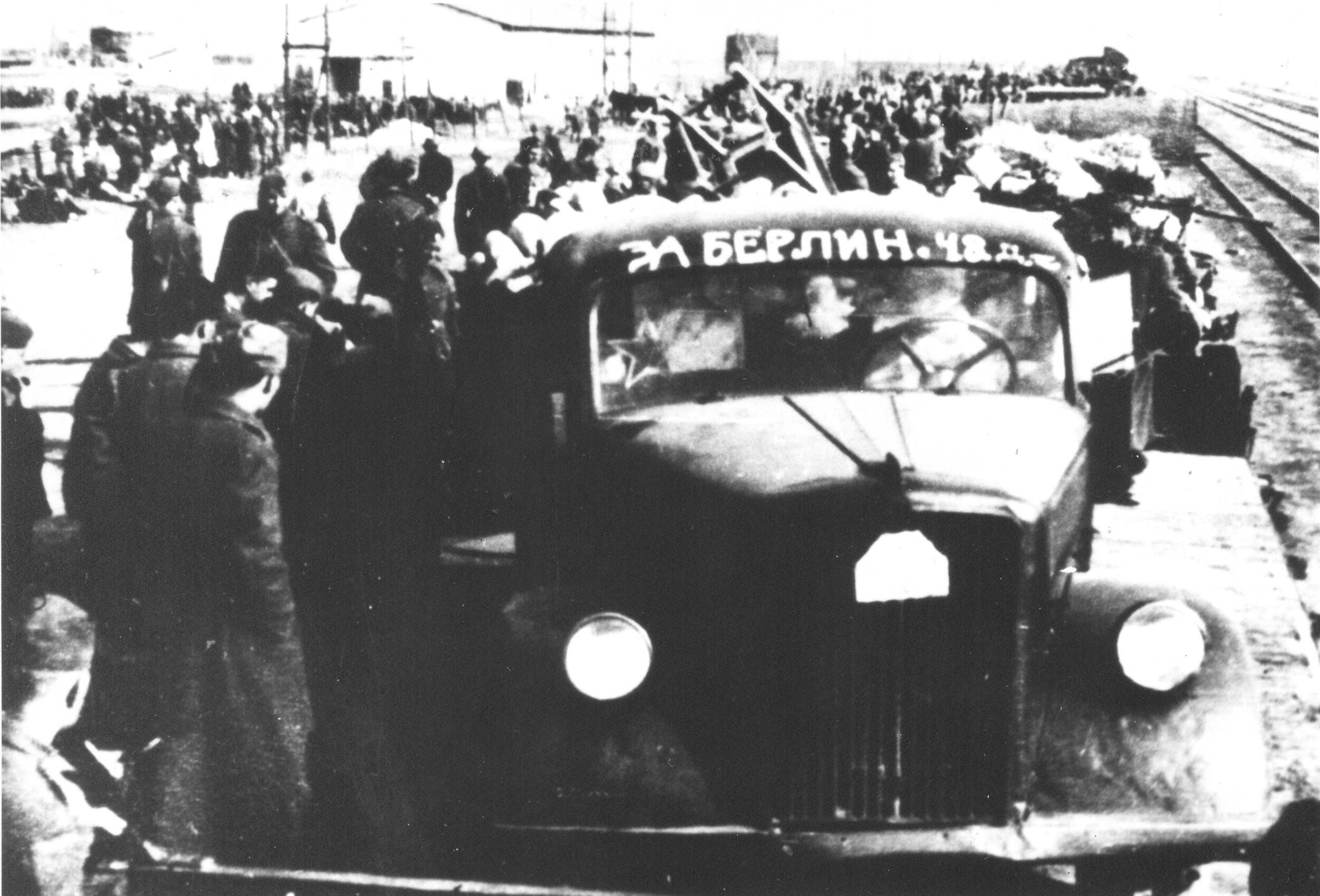 Srpskohrvatski / српскохрватски: Jedinice 15. makedonskog korpusa prolaze kroz Batajnicu na putu za Sremski front, 15. marta 1945.